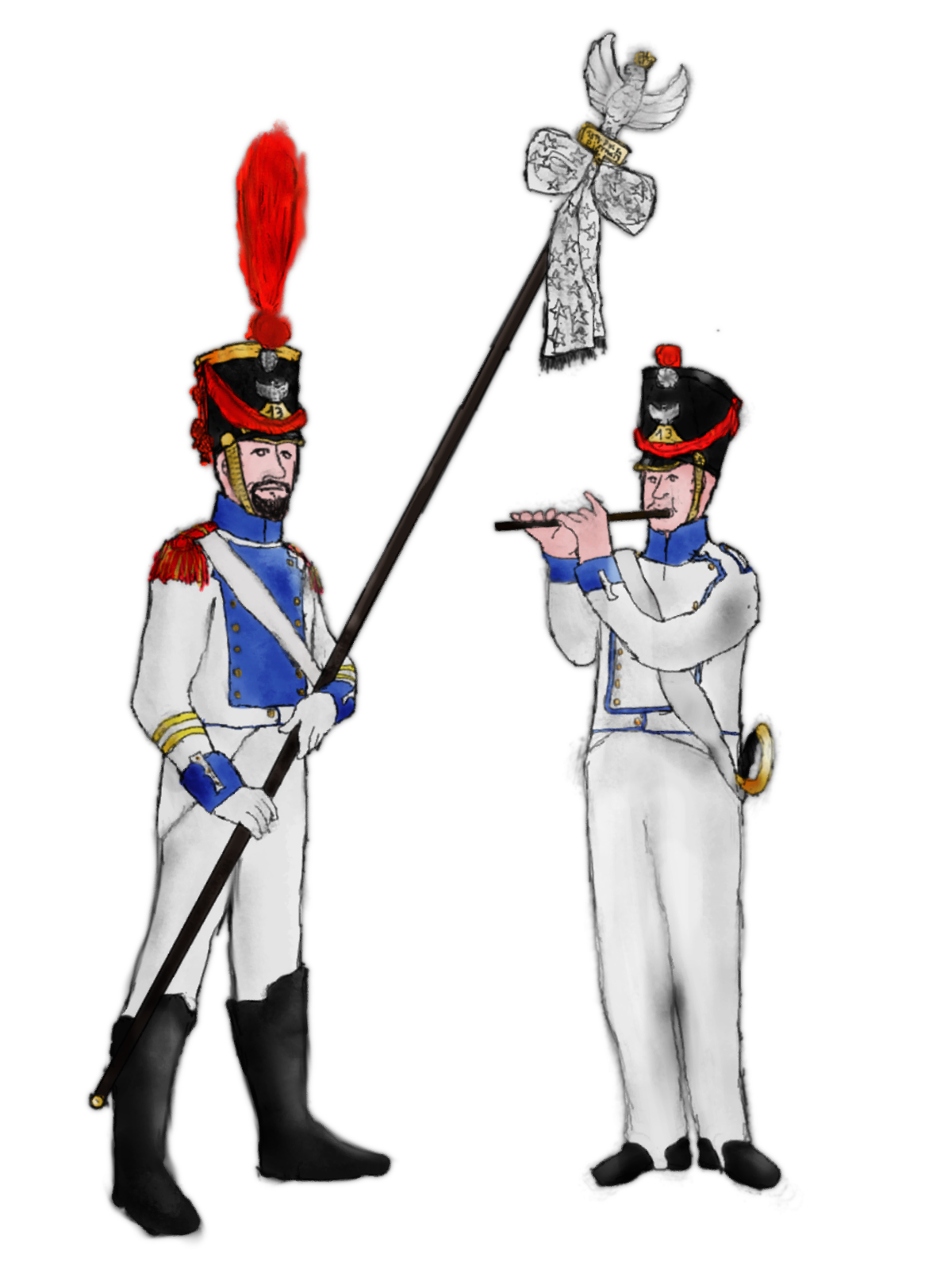 Sierżant orłowy wraz z orłem 13 pułku piechoty przy nim flecista